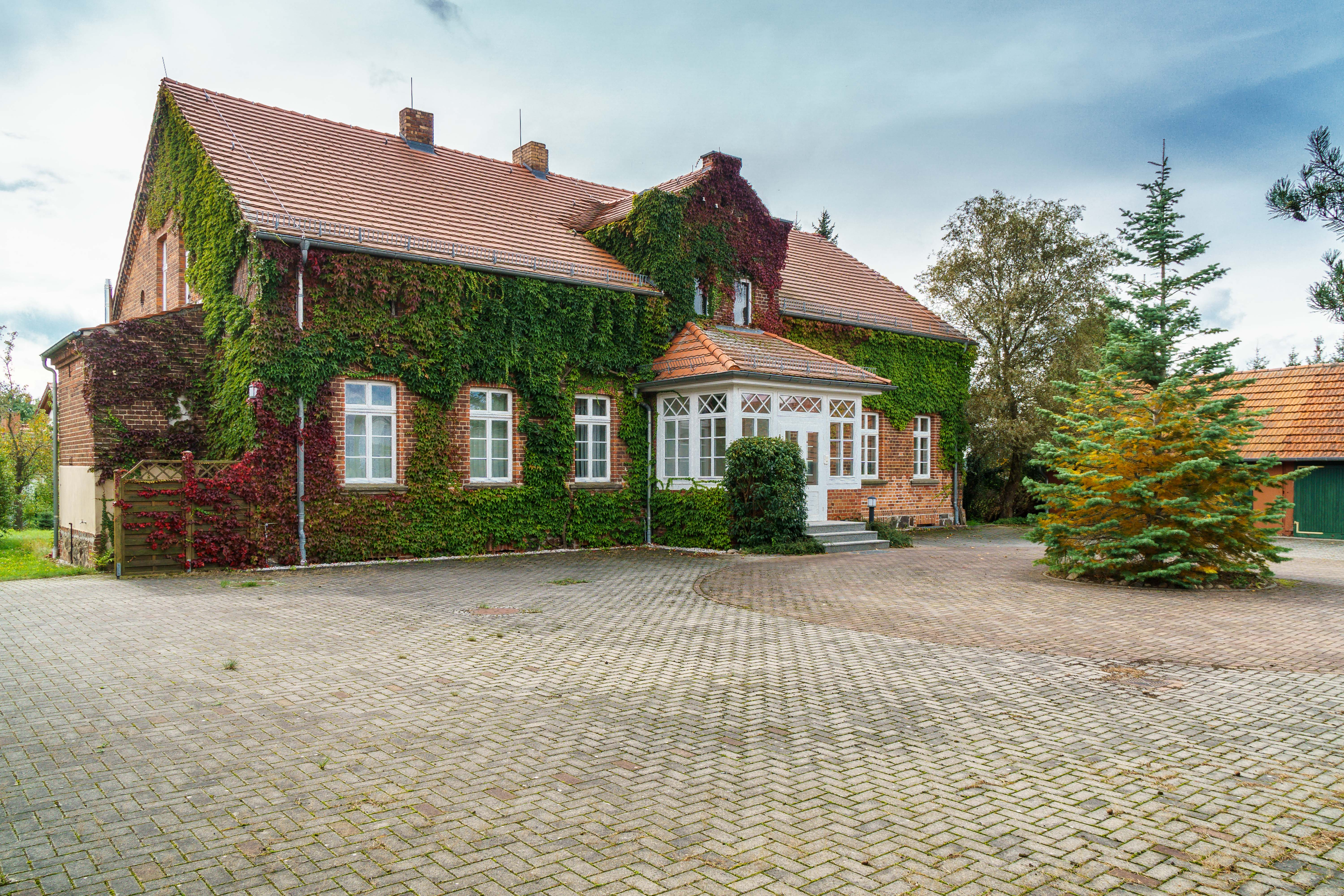 Oberförsterei, Dorfstraße 17, Ahornweg 4, 6 in Hohenbucko